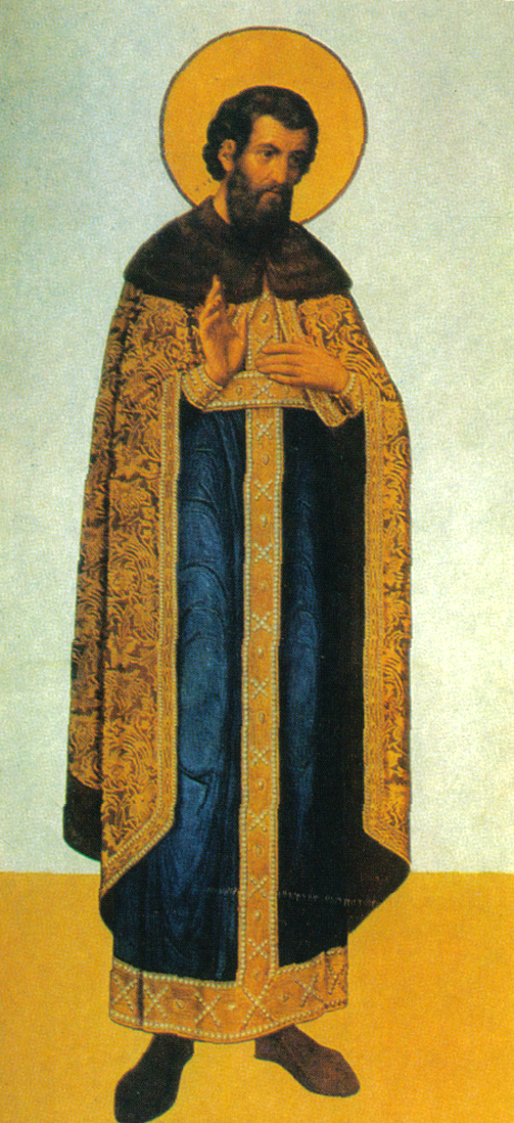 Роспись Грановитой палаты. Фрагмент. 1881-1882.